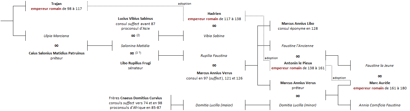 Famille des Annii Veri sous les Flaviens et les Antonins. Arbre non exhaustif.